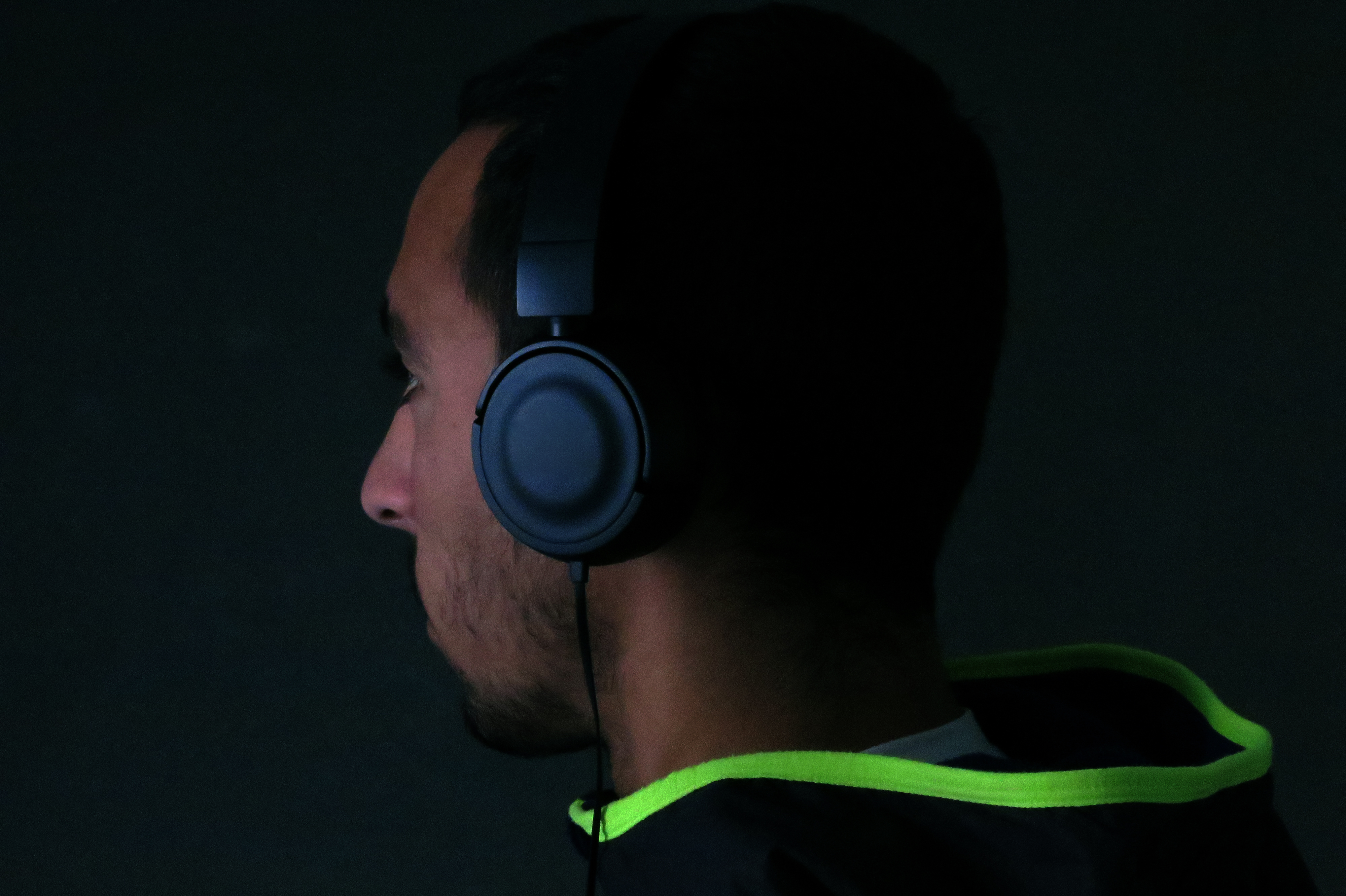 אוזניות לשמיעת מוזיקה